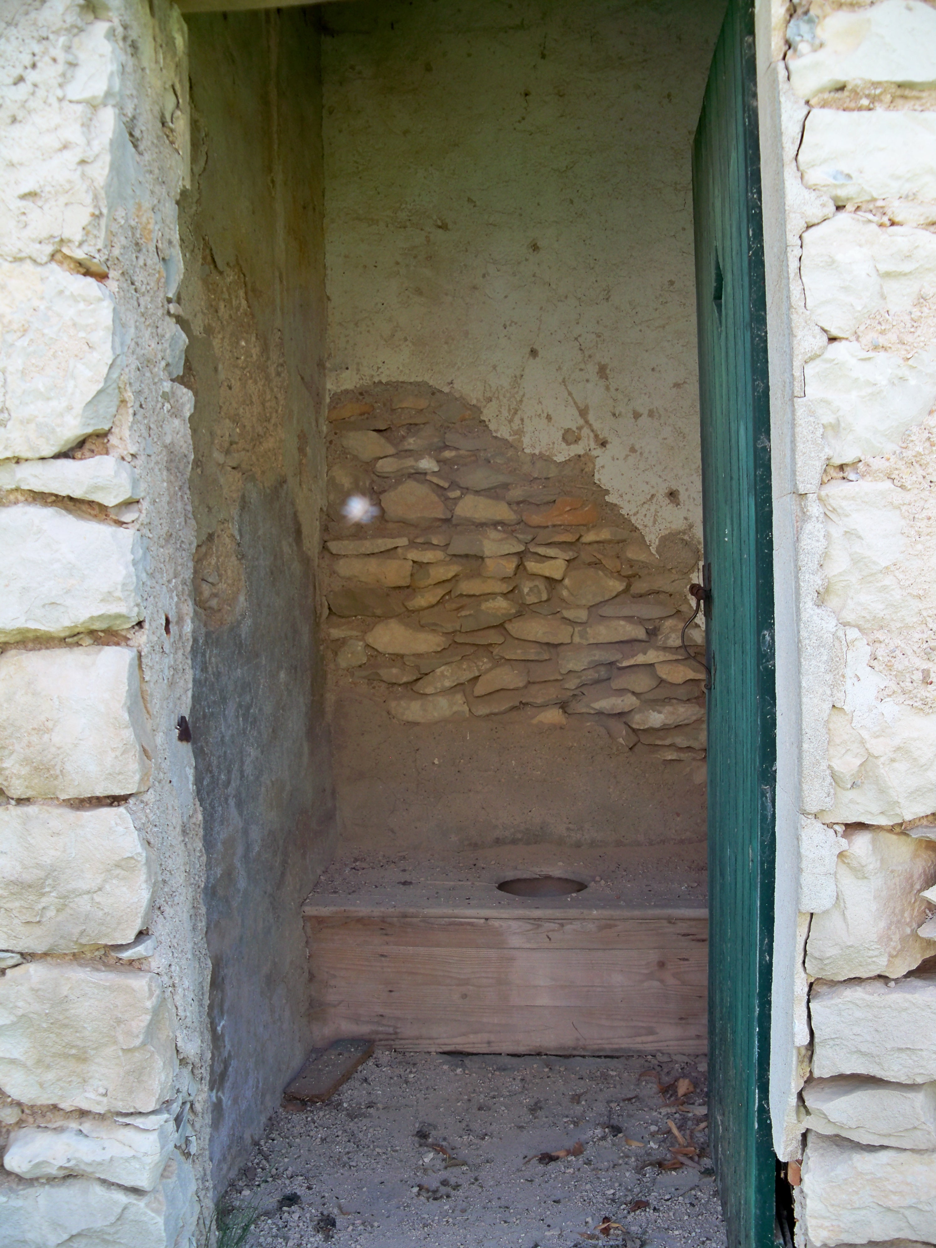 ancienne école du Redortiers (04), latrines